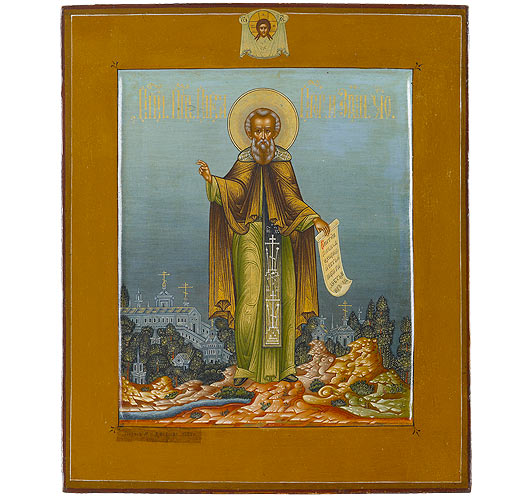 ПРЕПОДОБНЫЙ САВВА СТОРОЖЕВСКИЙ 1887 год. Михаил Иванович Дикарёв. Мстёра Размер: 31,1 х 26 см . Дерево, левкас, темпера. Происхождение. Неизвестно. Приобретена в Москве в 2008 г. Реставрация. Реставрирована А.В. Констанитиновым в 2008 г. Сохранность. Незначительные тонировки по утратам красочного слоя. На автографе оставлен слой старого покрытия. Надпись на нижнем поле слева: «Писалъ М.И. Дикаревъ. 1887 г.» Выставки: Царицыно, 2008–2009. Литература: Русские иконы, 2008. С. 32.